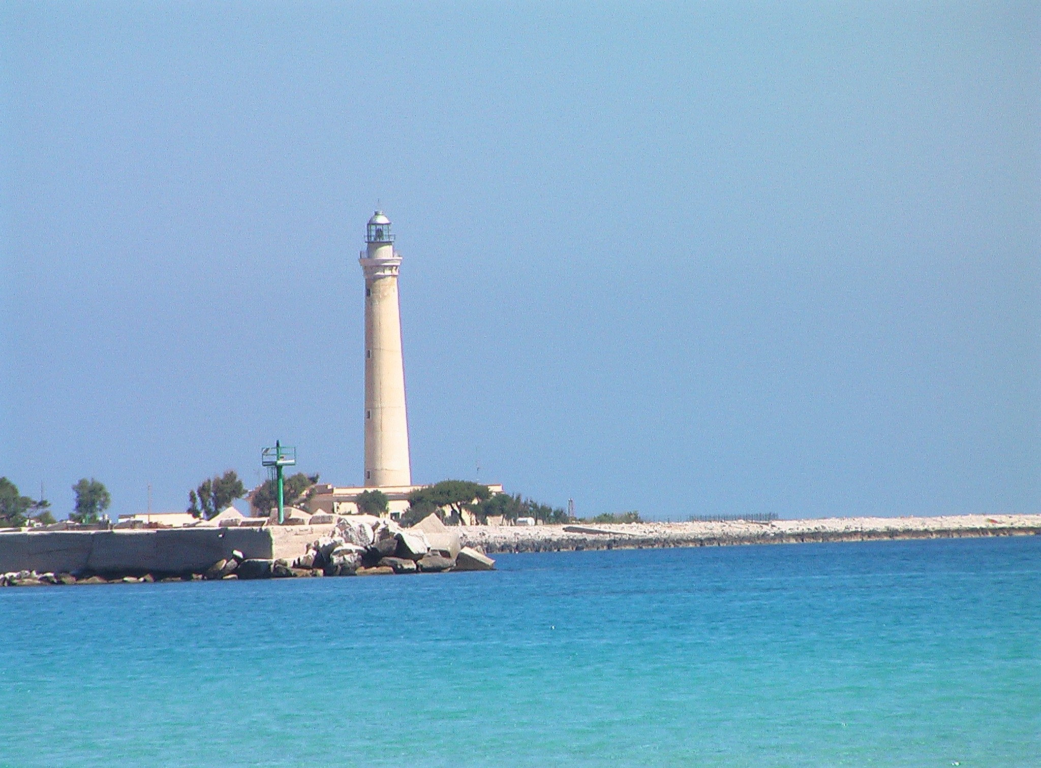 Faro di San Vito